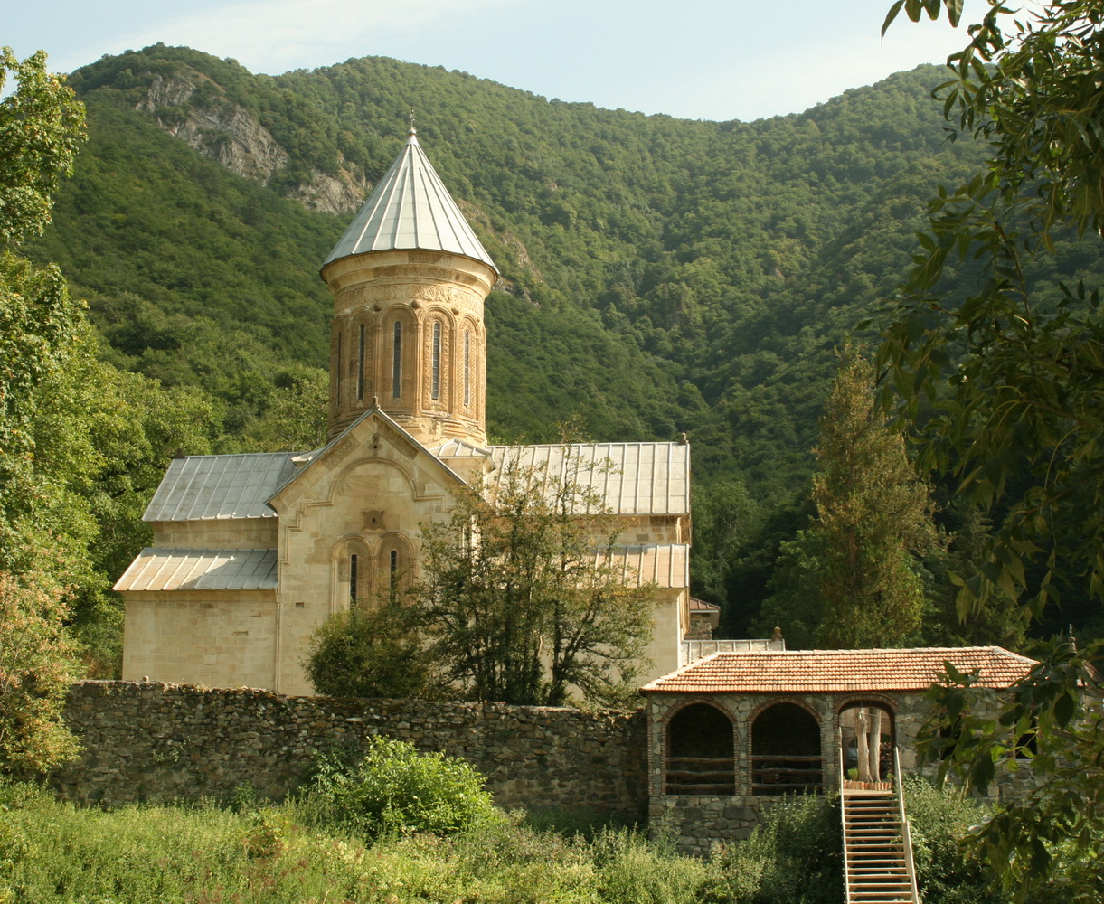 Кватахеви. Храм монастыря Кватахеви